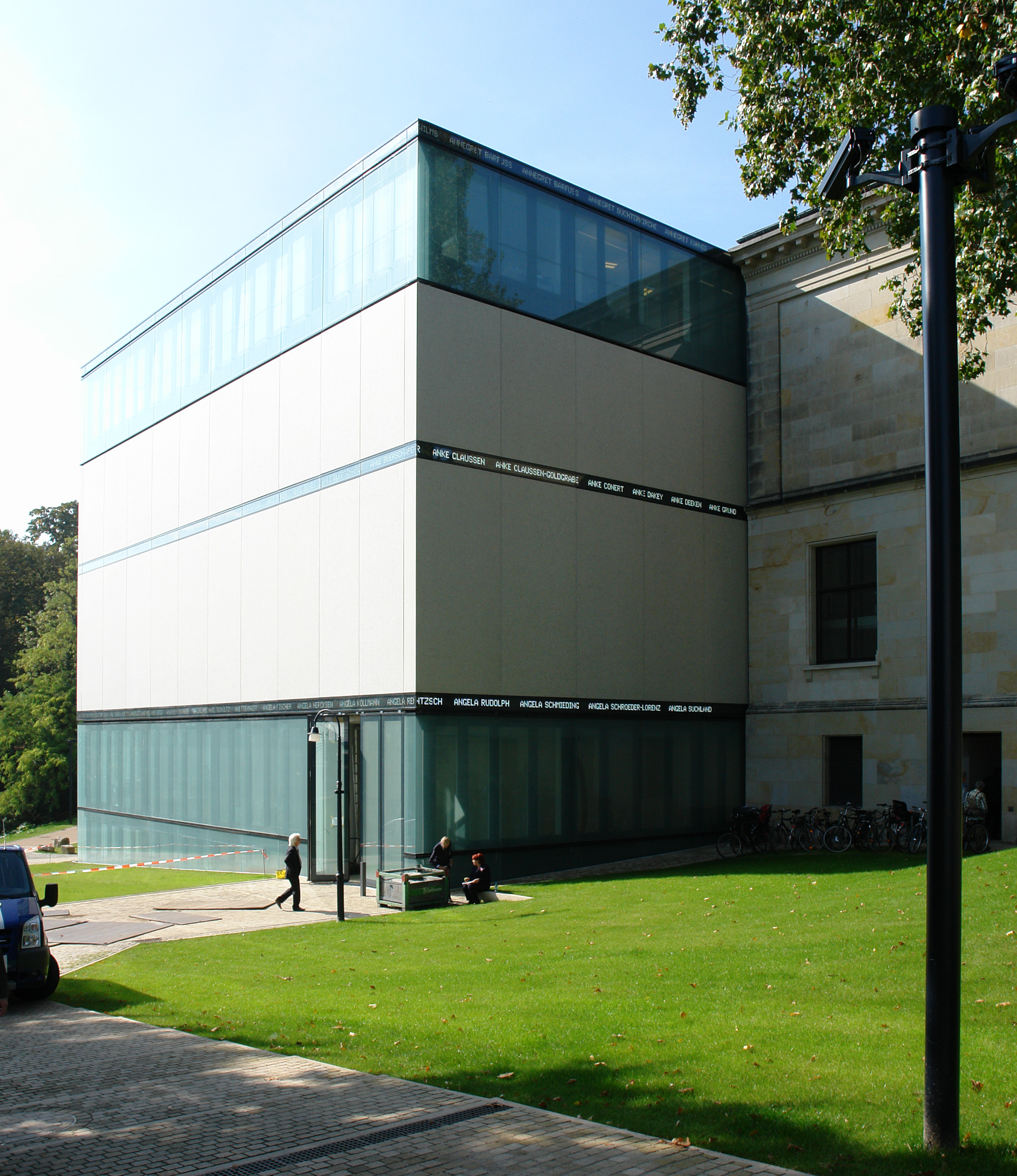 Kunsthalle Bremen. Erweiterungsbauten an der Ost- und Westseite (2009–2011). Architekten: Hufnagel, Pütz und Rafaelian aus Berlin